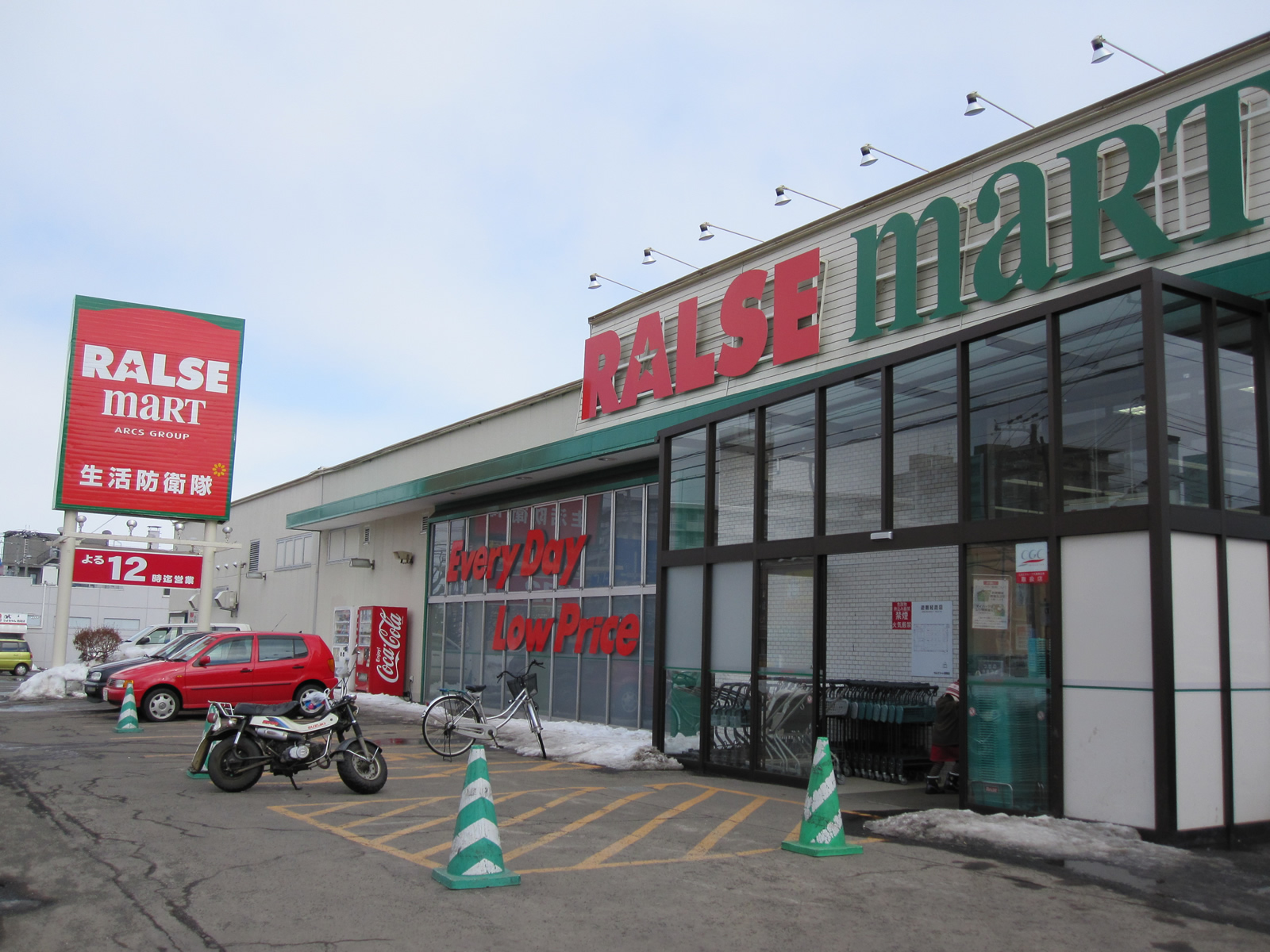 ラルズマート西岡店（札幌市豊平区）